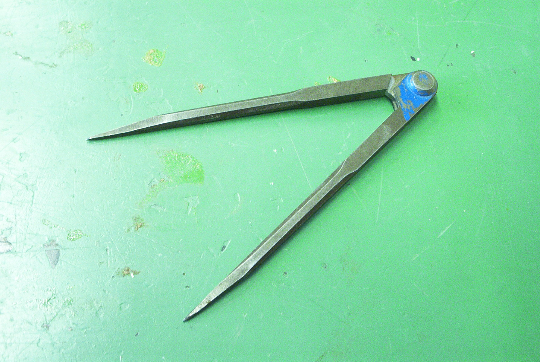 zelf gemaakte foto voor het publiek domein. Martink.